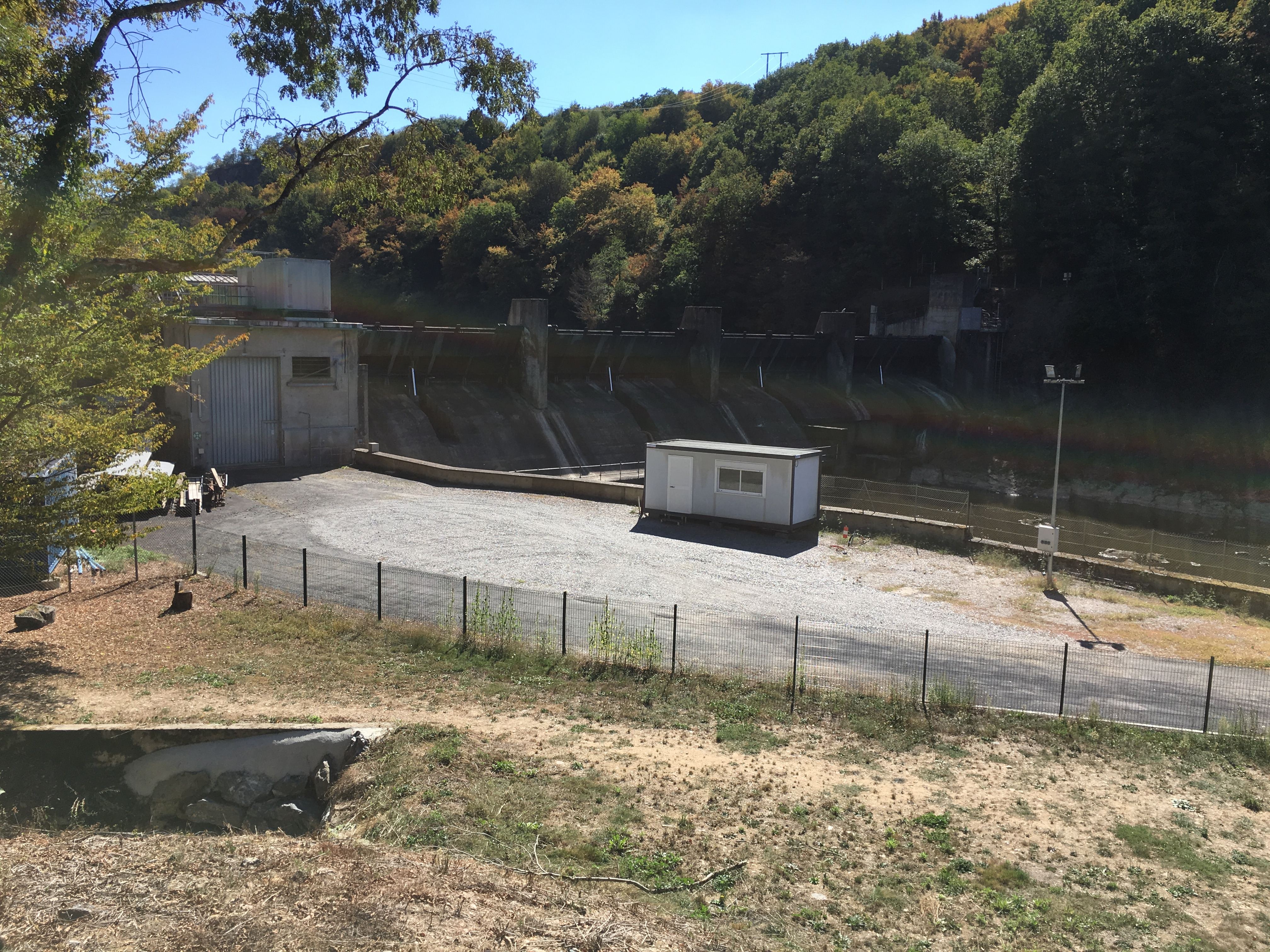 Barrage de La Roche-Bat-L'Aigue (36) : Vue générale du barrage.